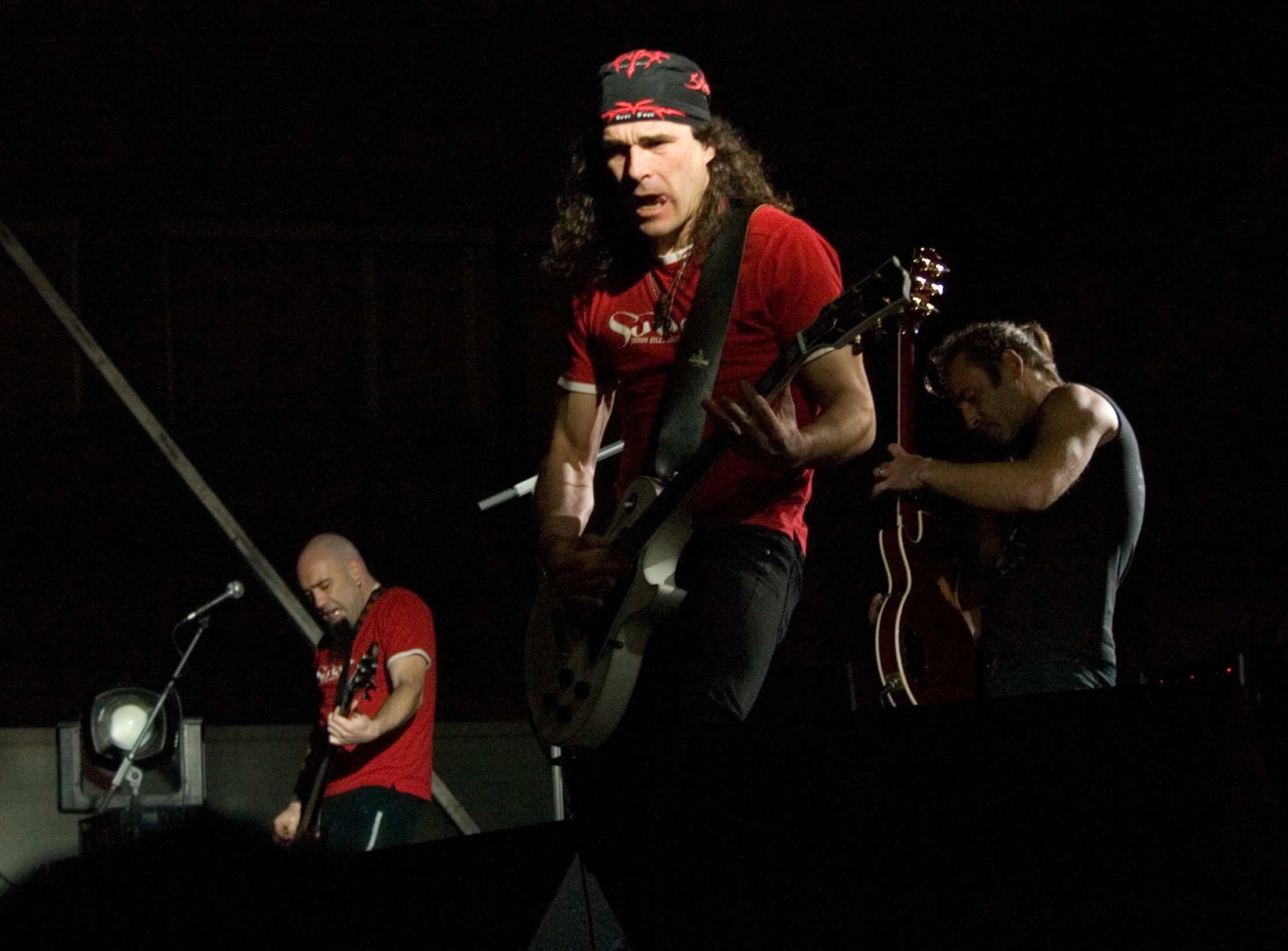 Actuación de Su ta Gar en el décimo aniversario de Mondragón Unibertsitatea.